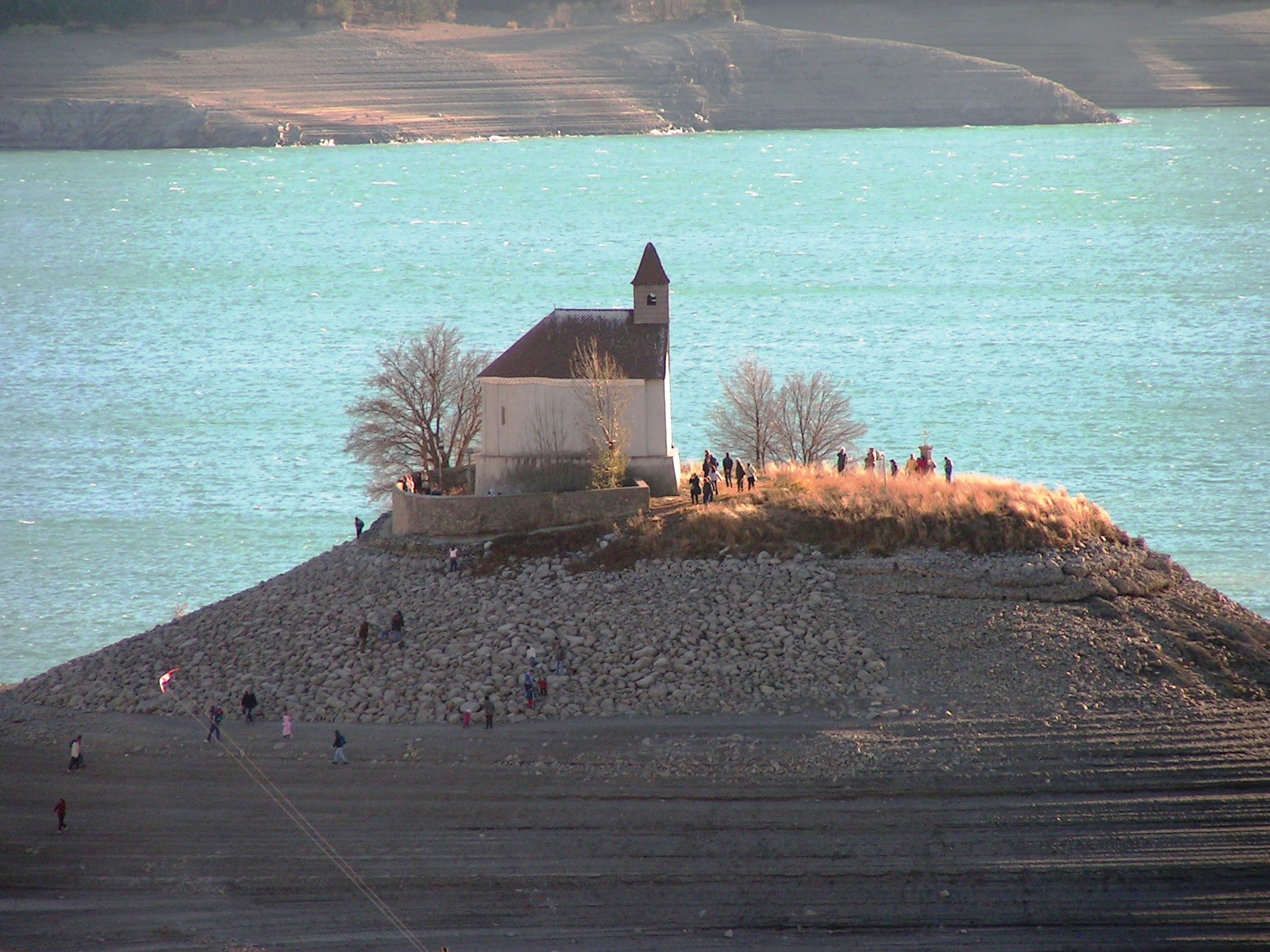 chapelle Saint-Michel Lac de Serre-Ponçon en hiver